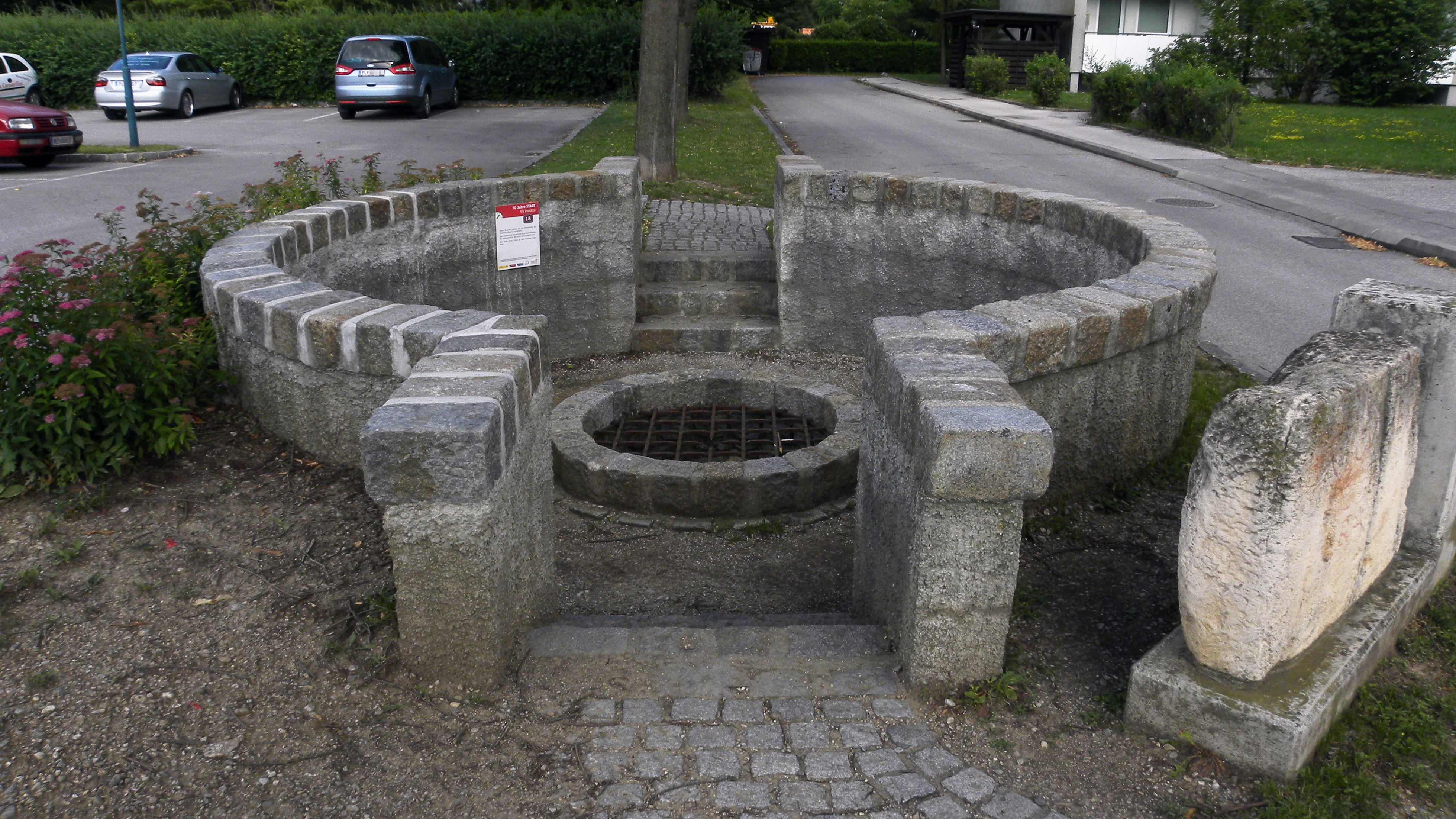 Der ehemalige römische Brunnen liegt östlich des ehem. Reiterkastells und diente der zivilen Bevölkerung.